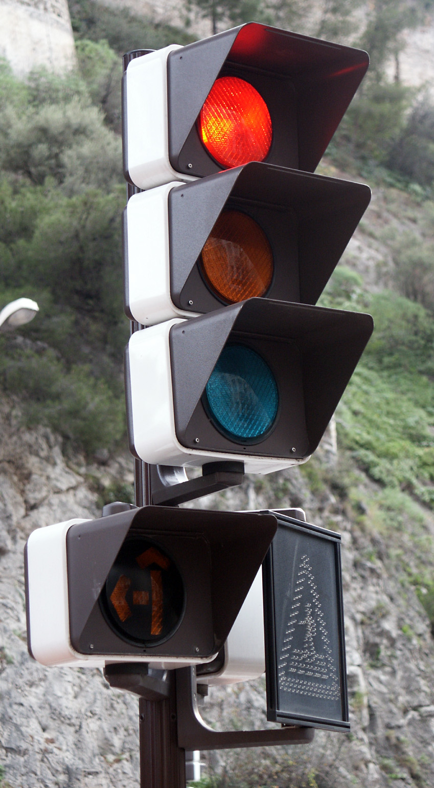 Feu rouge de circulation